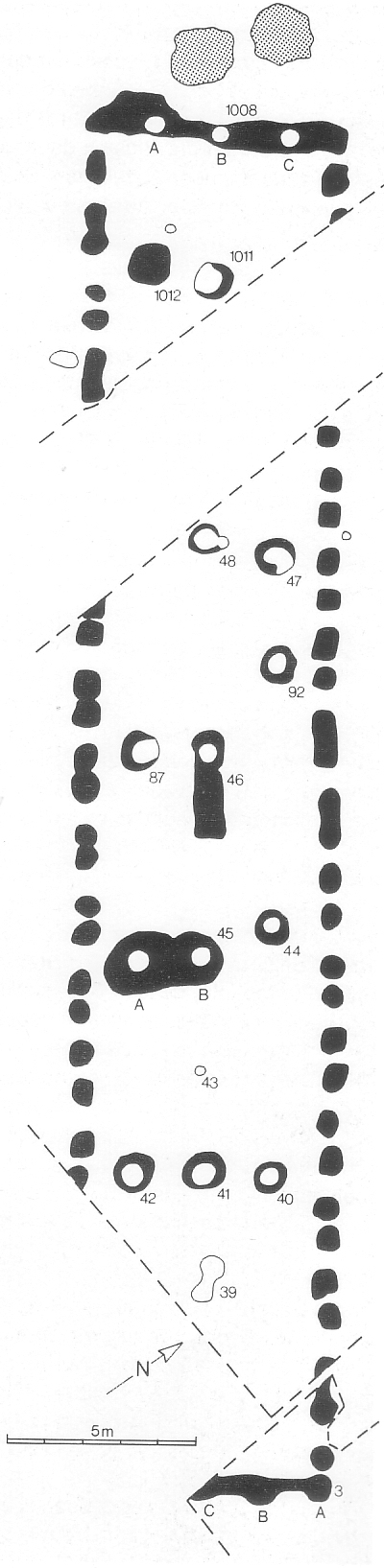 Bandkeramische Siedlung auf dem Mühlengrund in Rosdorf, Gebäudegrundriss XXVI, Großbau, 35,5 Meter lang, etwa 6,5 Meter breit